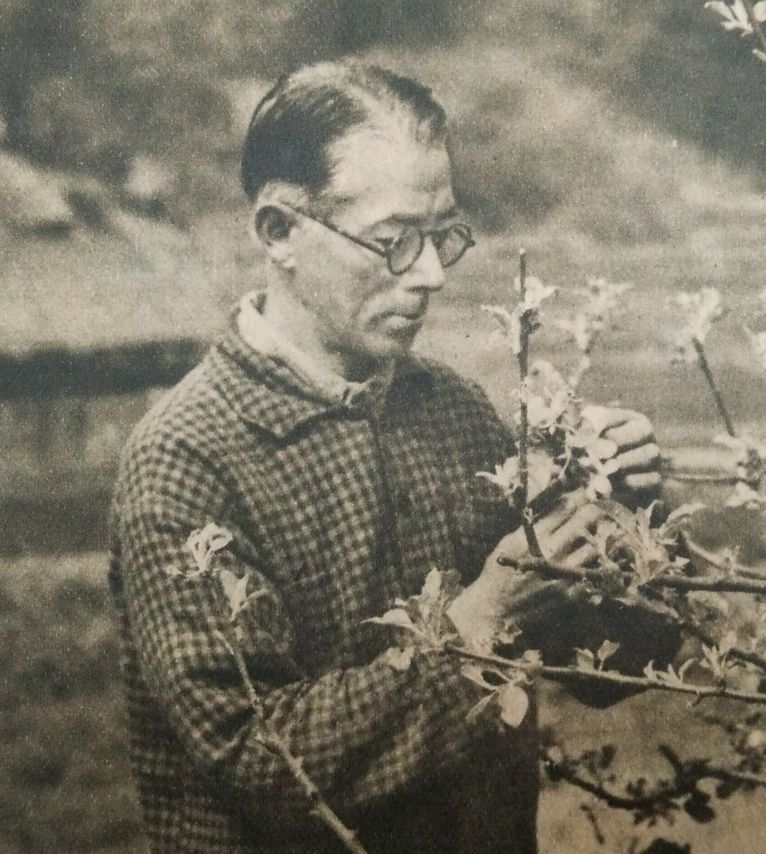 島田嘉七